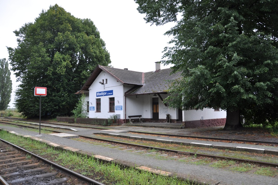 Bahnhof Mladějov na Moravě, Tschechien